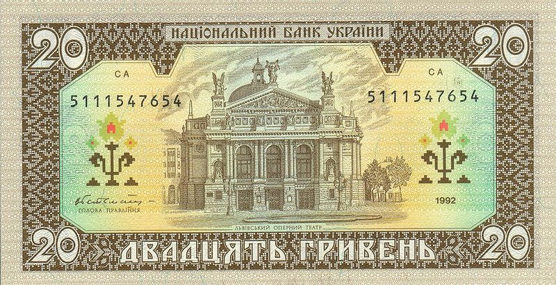 20 Hryvnia banknote (Ukraine), 1992, back (reverse). Львовский оперный театр.